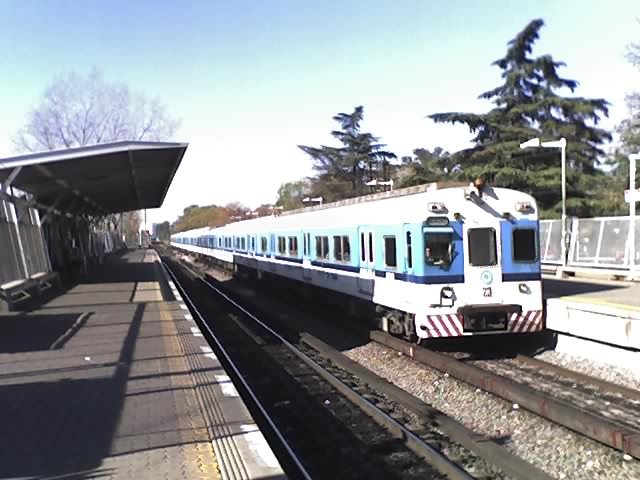 Estación Paso del Rey, provincia de Buenos Aires.